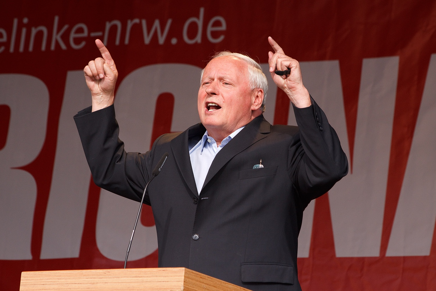 Oskar Lafontaine (DIE LINKE) während einer Wahlkampfveranstaltung in Hamm